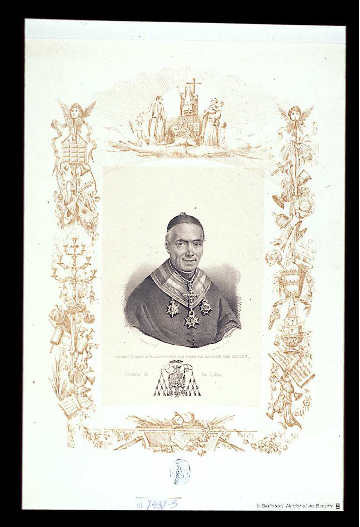 Retrato de Antonio Posada Rubín de Celis, patriarca de Indias, litografía de Luis Carlos Legrand